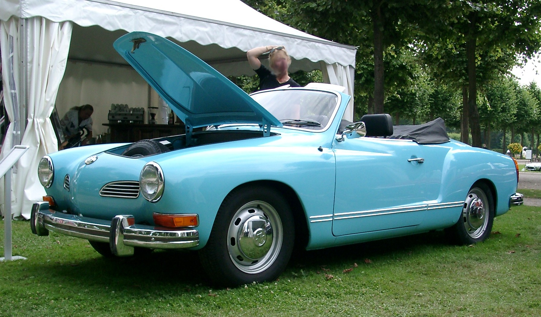 Karmann Ghia, fotografiert anläßlich des European Concours d'Elegance 2002 in Schwetzingen